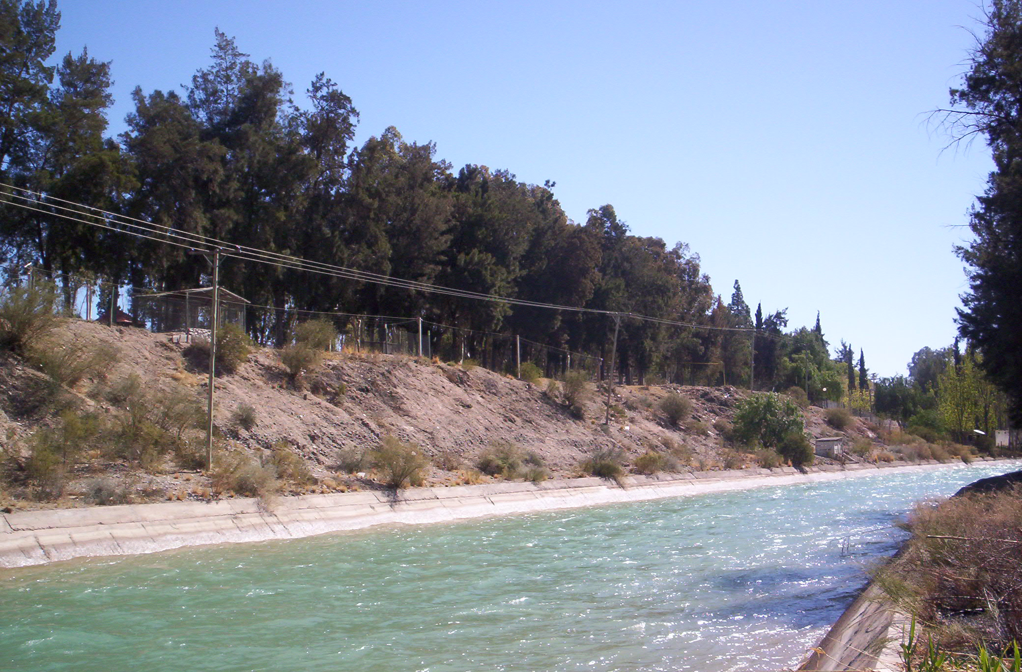 Canal de regadio en Rivadavia, provincia de San Juan, Argentina